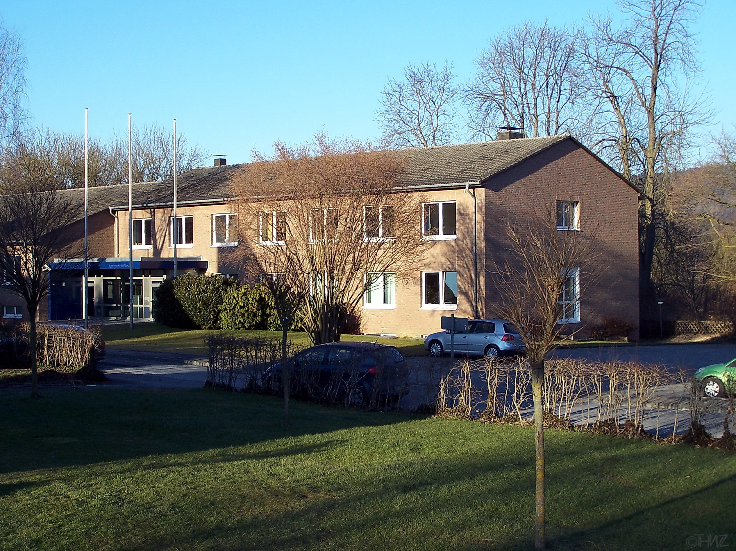 Das Amtsgericht Warstein, war ursprünglich im alten Warsteiner Rathaus (nicht mehr existent) integriert.